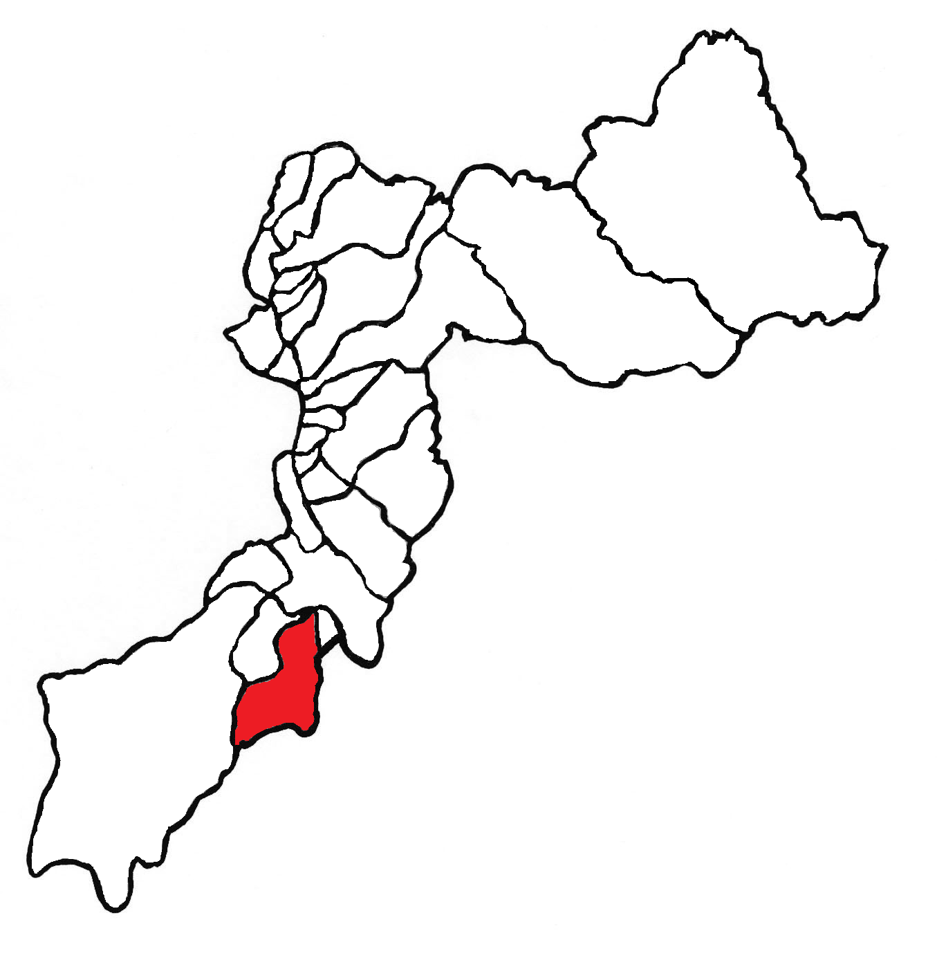 Ubicación del distrito en la provincia de Huancayo, departamento de Junín, Perú